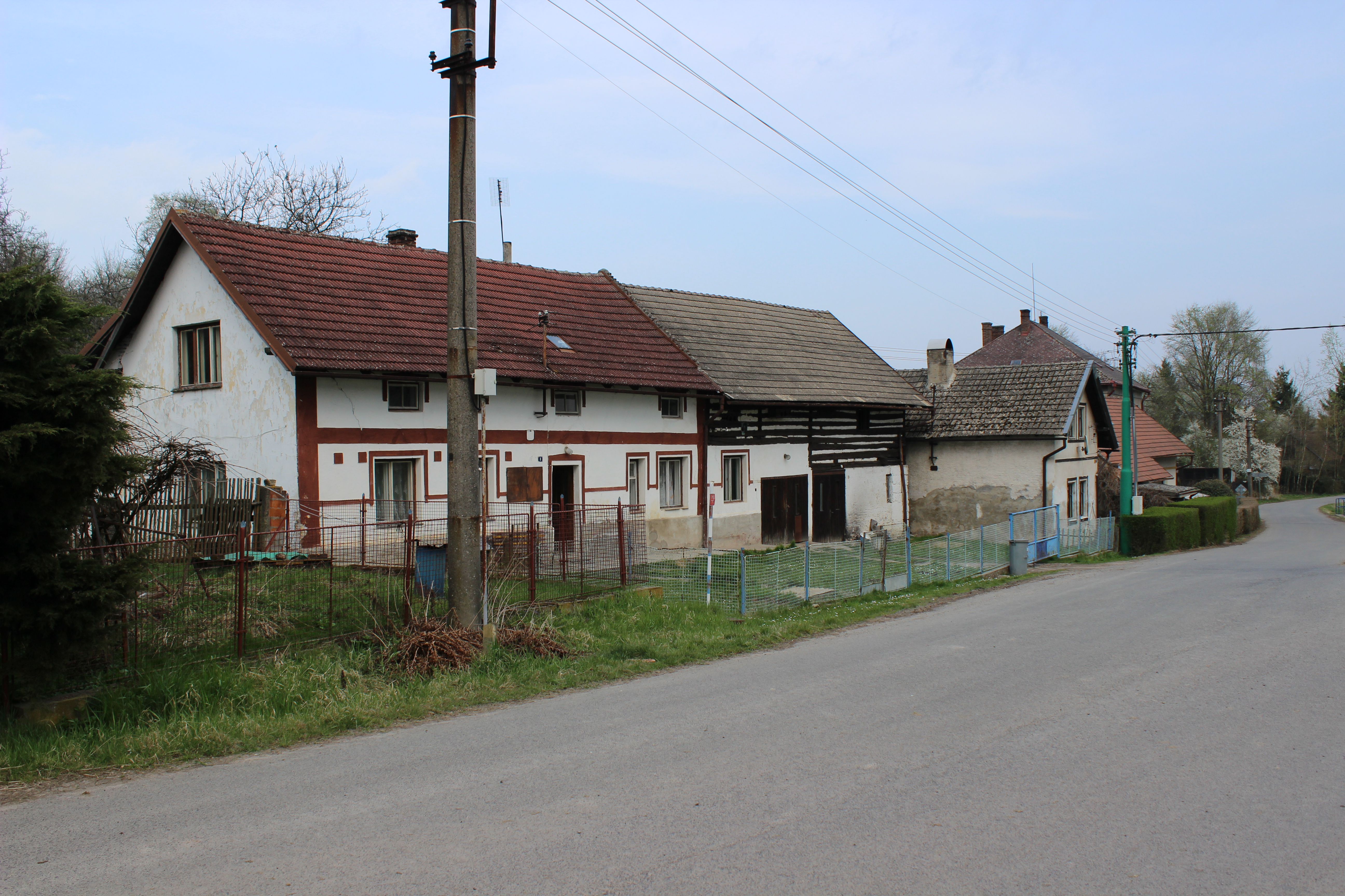 Dům číslo popisné 9 v Doubravicích, části Katusic. This photograph was taken with a Canon EOS 600D.